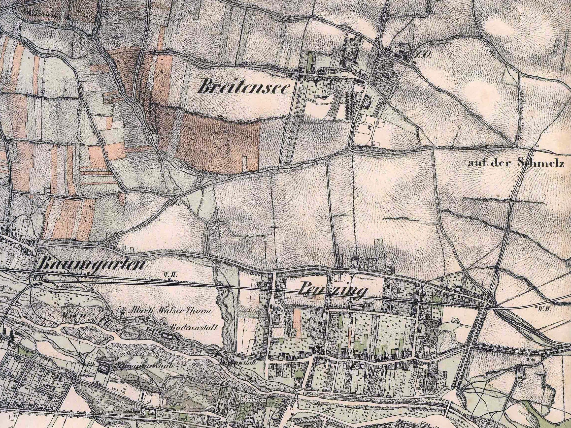 Breitensee und Penzing um 1820, plus Bahnlinien 1860